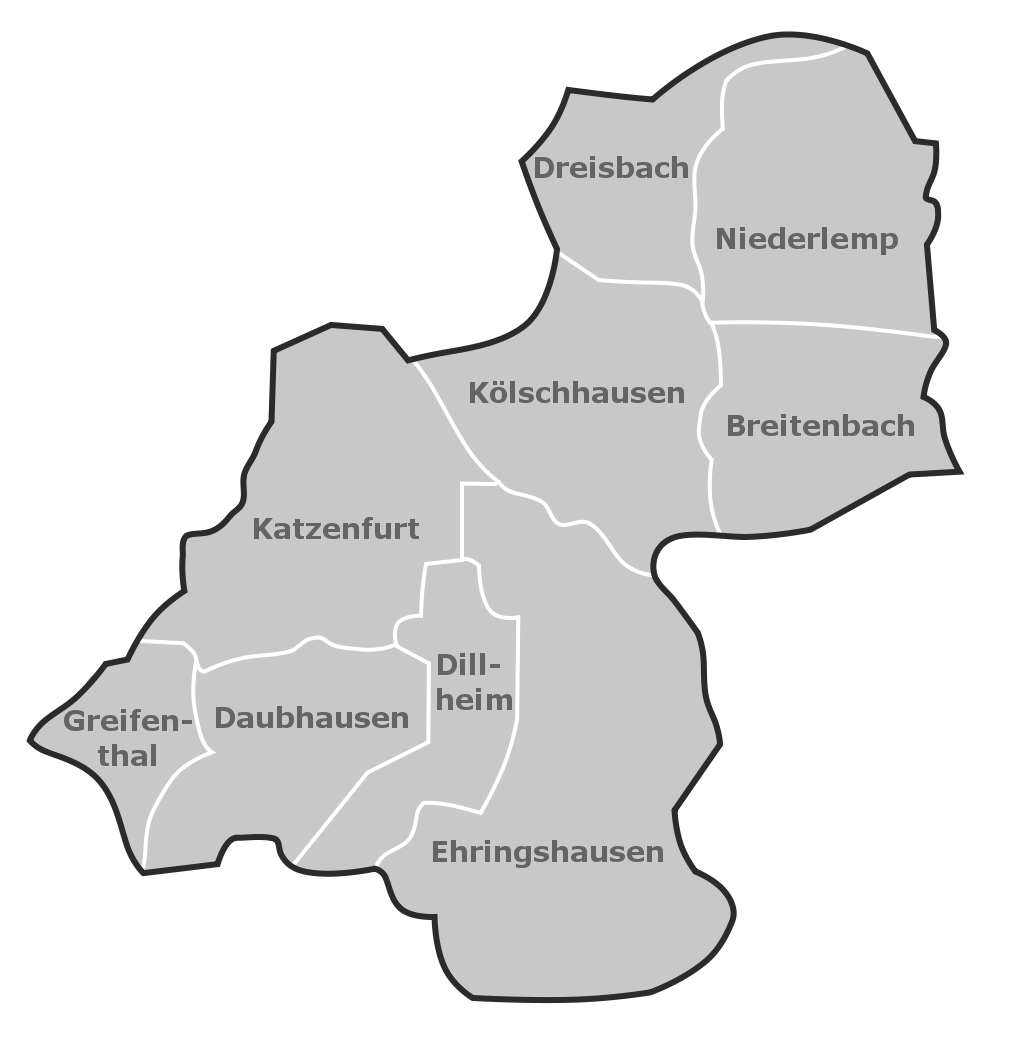 Karte der Ortsteile von Ehringshausen